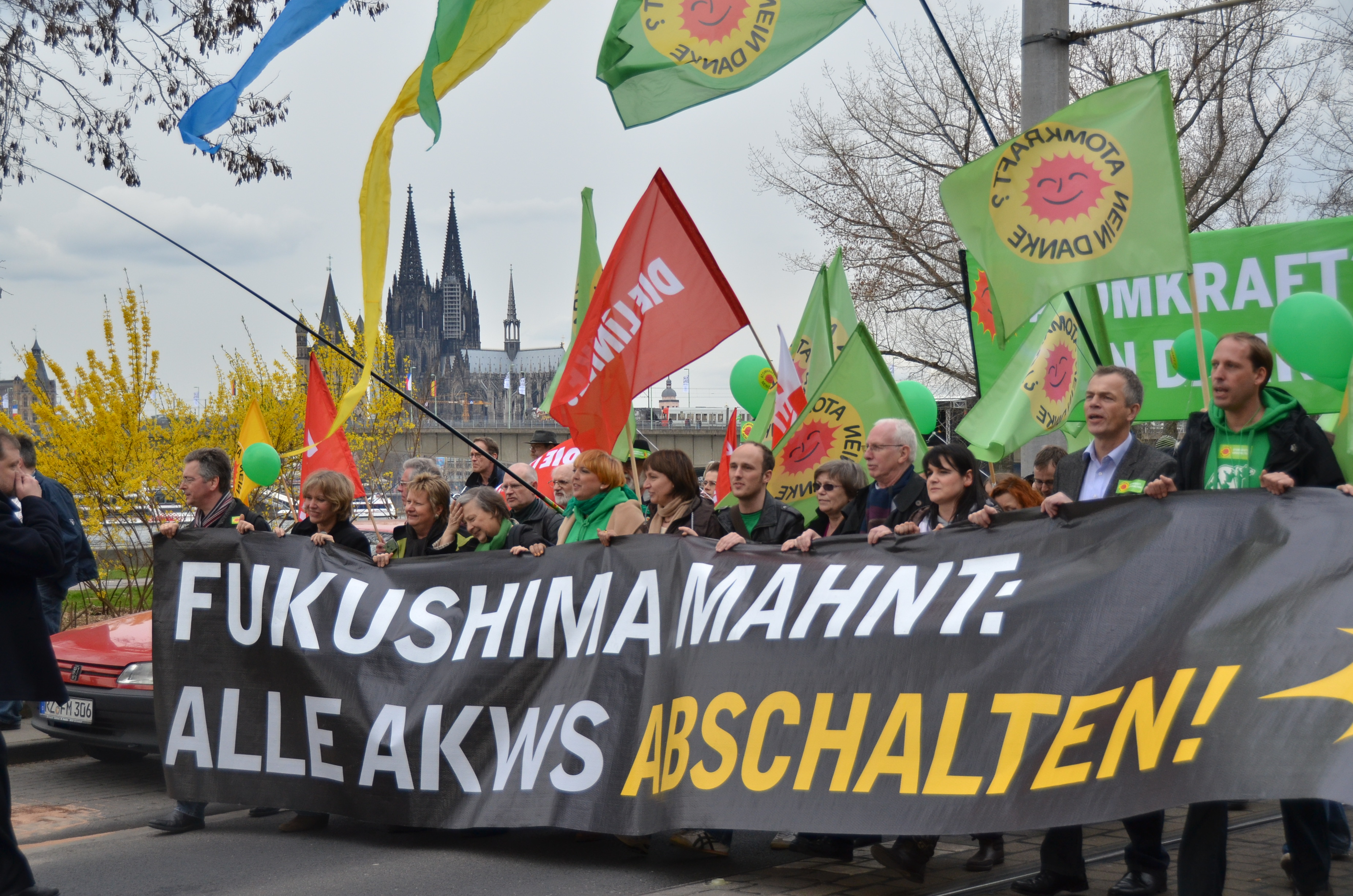 Hier der Teil des Demozuges, der vom Ottoplatz in Köln-Deutz startete.